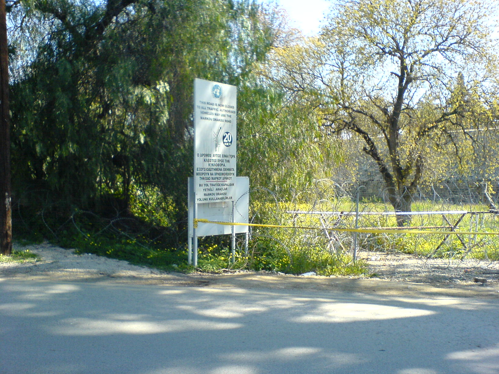 UN buffer zone in Nicosia, Cyprus